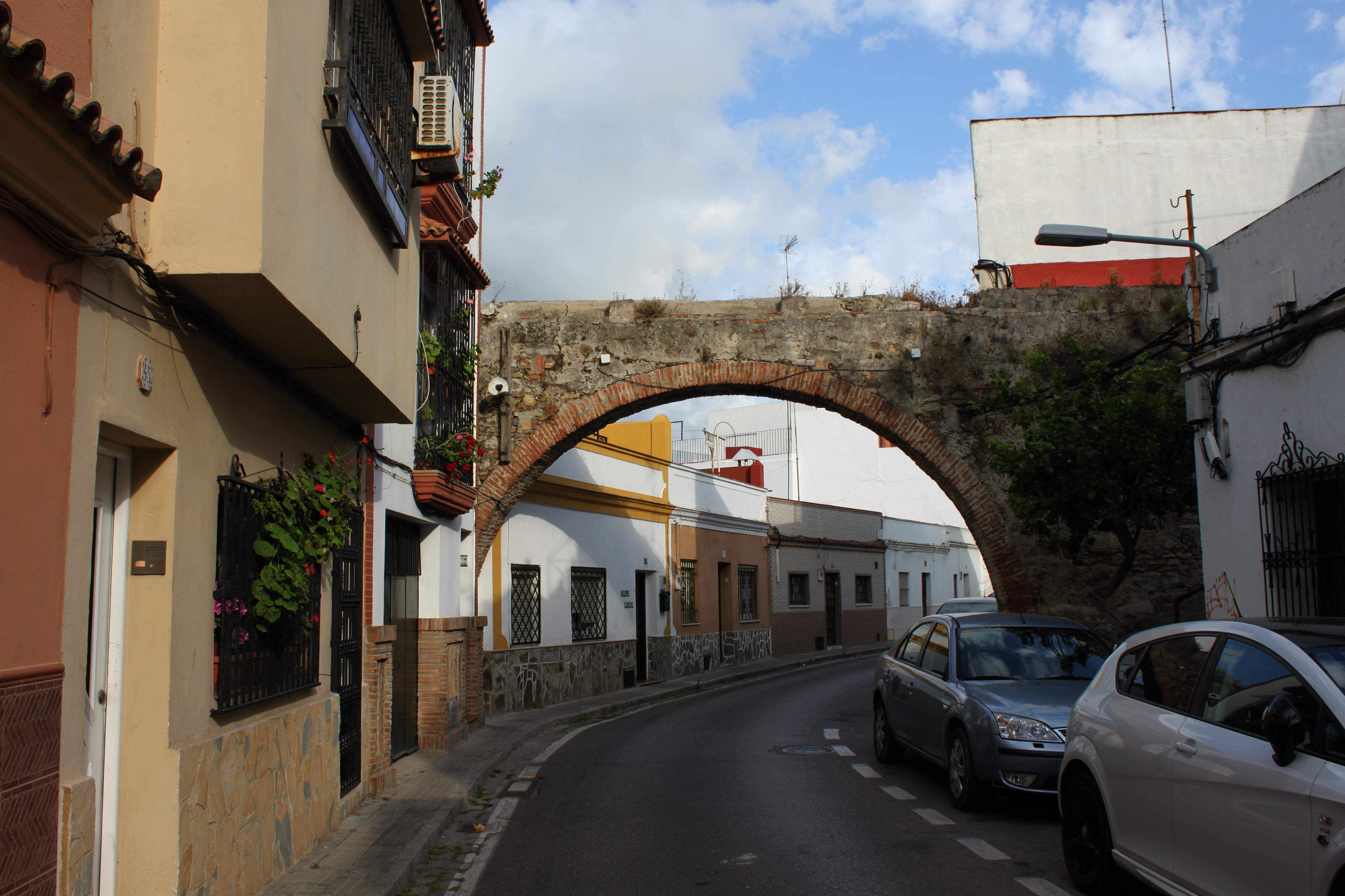 Restos de una arcada del Acueducto de Algeciras (1777) integrada entre varias viviendas de la Calle San Vivente de Paul. Algeciras, Andalucía, España.